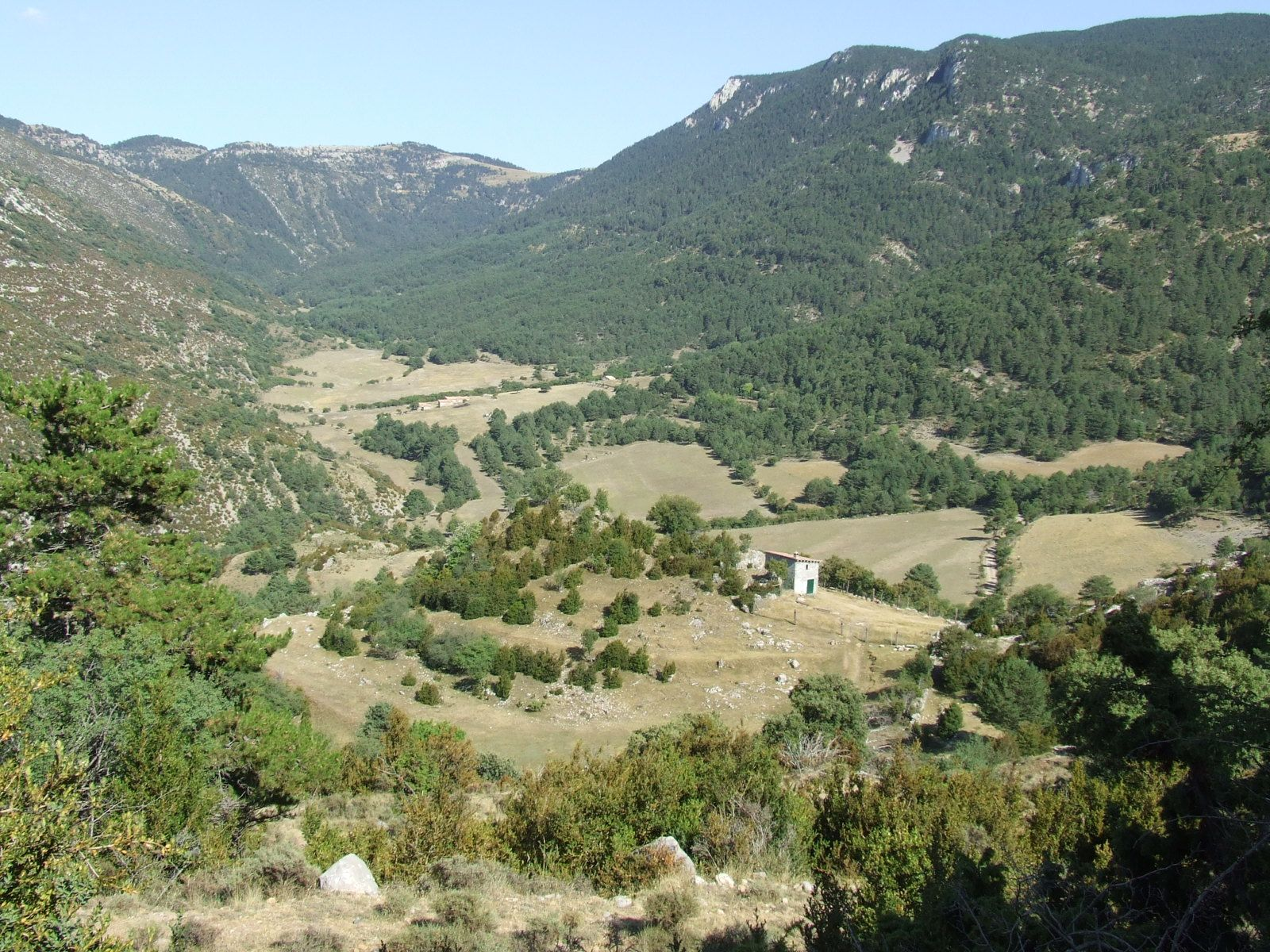 La Coma d'Orient (Hortoneda de la Conca, Conca de Dalt, Pallars Jussà)